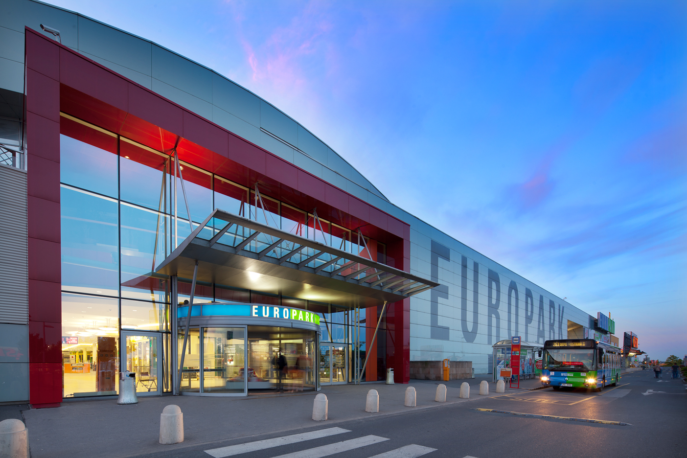 OC Europark